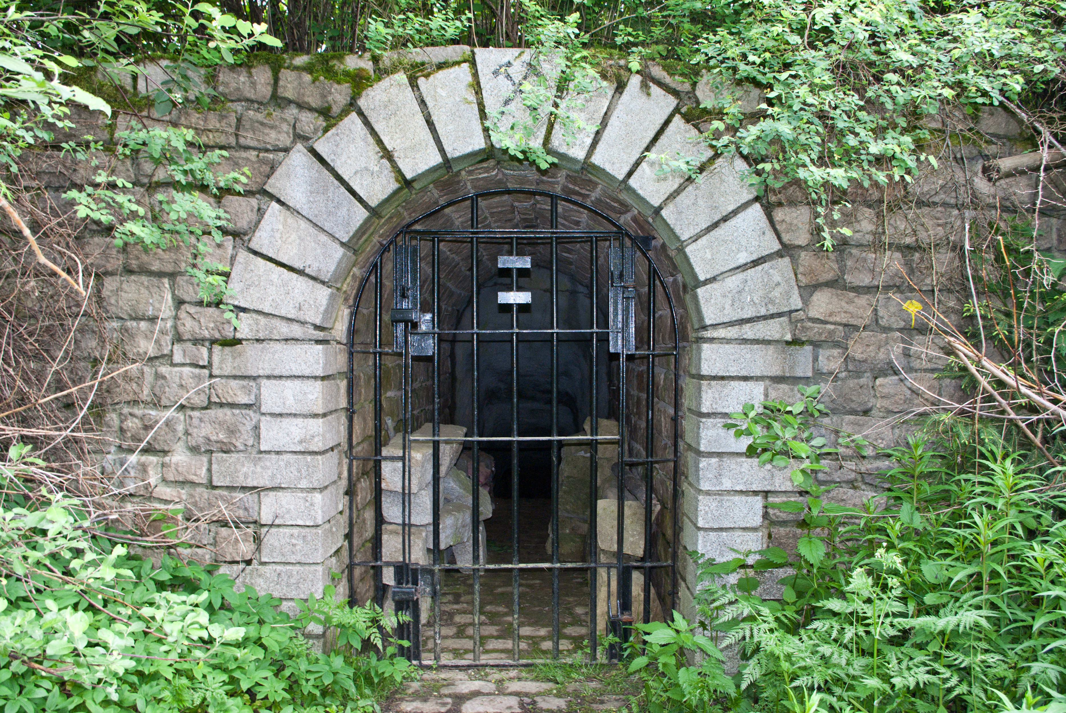 Rudný důl cínový, Jeroným (Čistá), Čistá